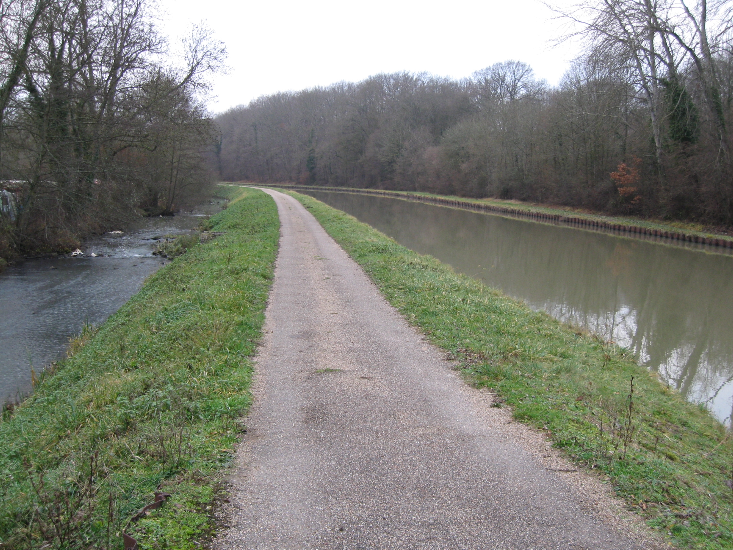 Ouzouer-sur-Trézée, Loiret, France. La Trézée à gauche, le canal de Briare à droite. Vue vers l'ouest-sud-ouest et vers l'aval, à la hauteur du camping d'Ouzouer.